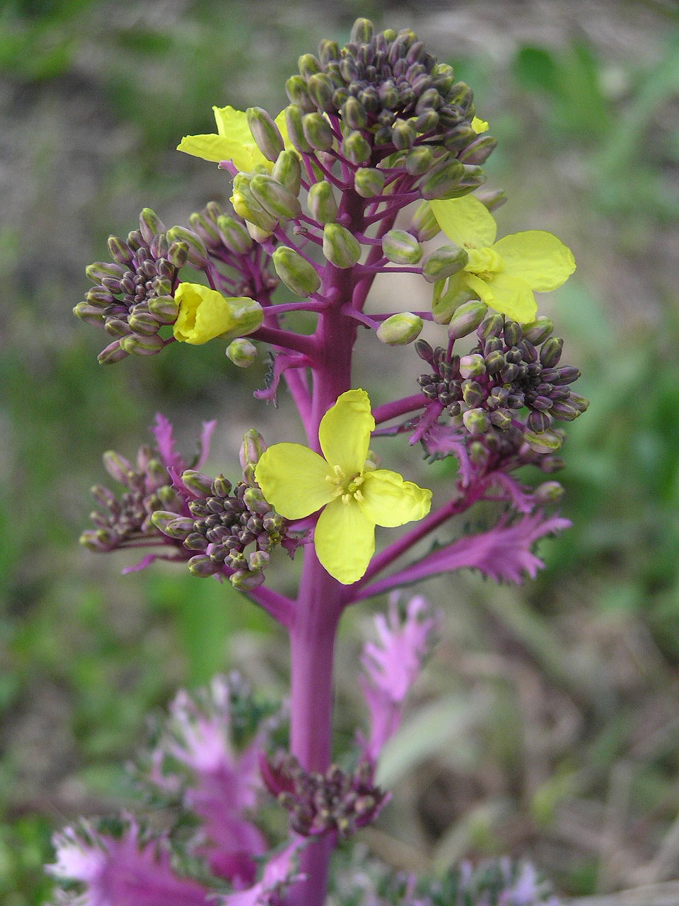 ハボタン（葉牡丹、学名：Brassica oleracea var. acephala）はアブラナ科アブラナ属の耐寒性の園芸植物。（シノニム Brassica oleracea L. var. tricolor Hort）